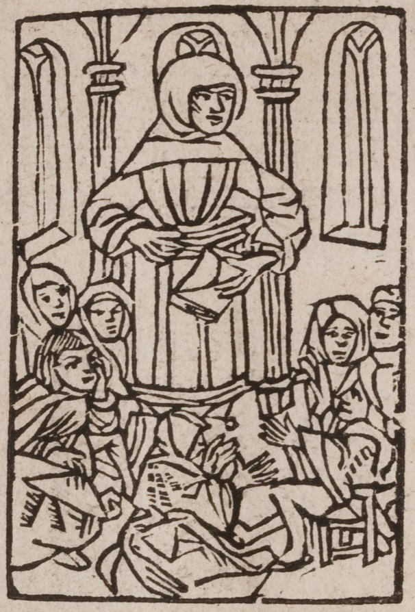 Dietrich Kolde (1435-1515) als Volksprediger, Holzschnitt in einer Ausgabe seines Christenspiegels, Deventer, zwischen 1492 und 1500 (SWB)